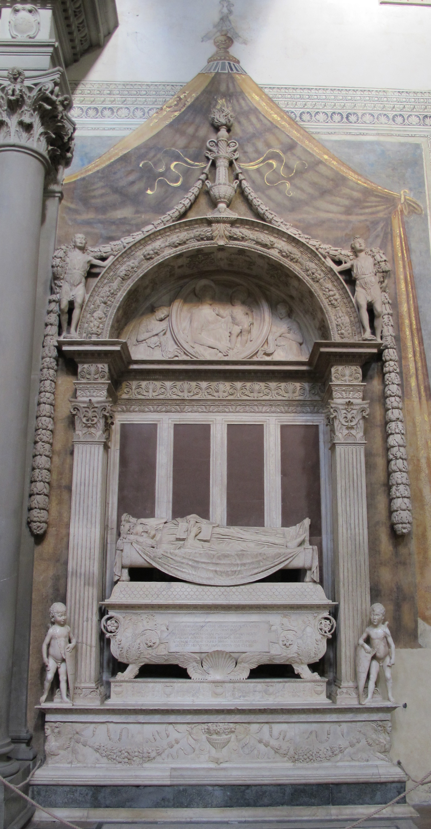 Desiderio da settignano, tomba marsuppini